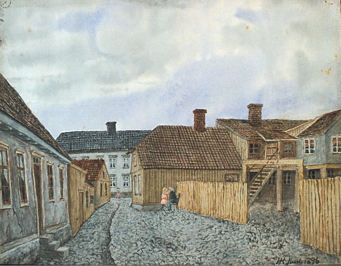 Søberggangen malt av Henrik Laurentius Helliesen i 1896 (bilde fra Oslo Museum)